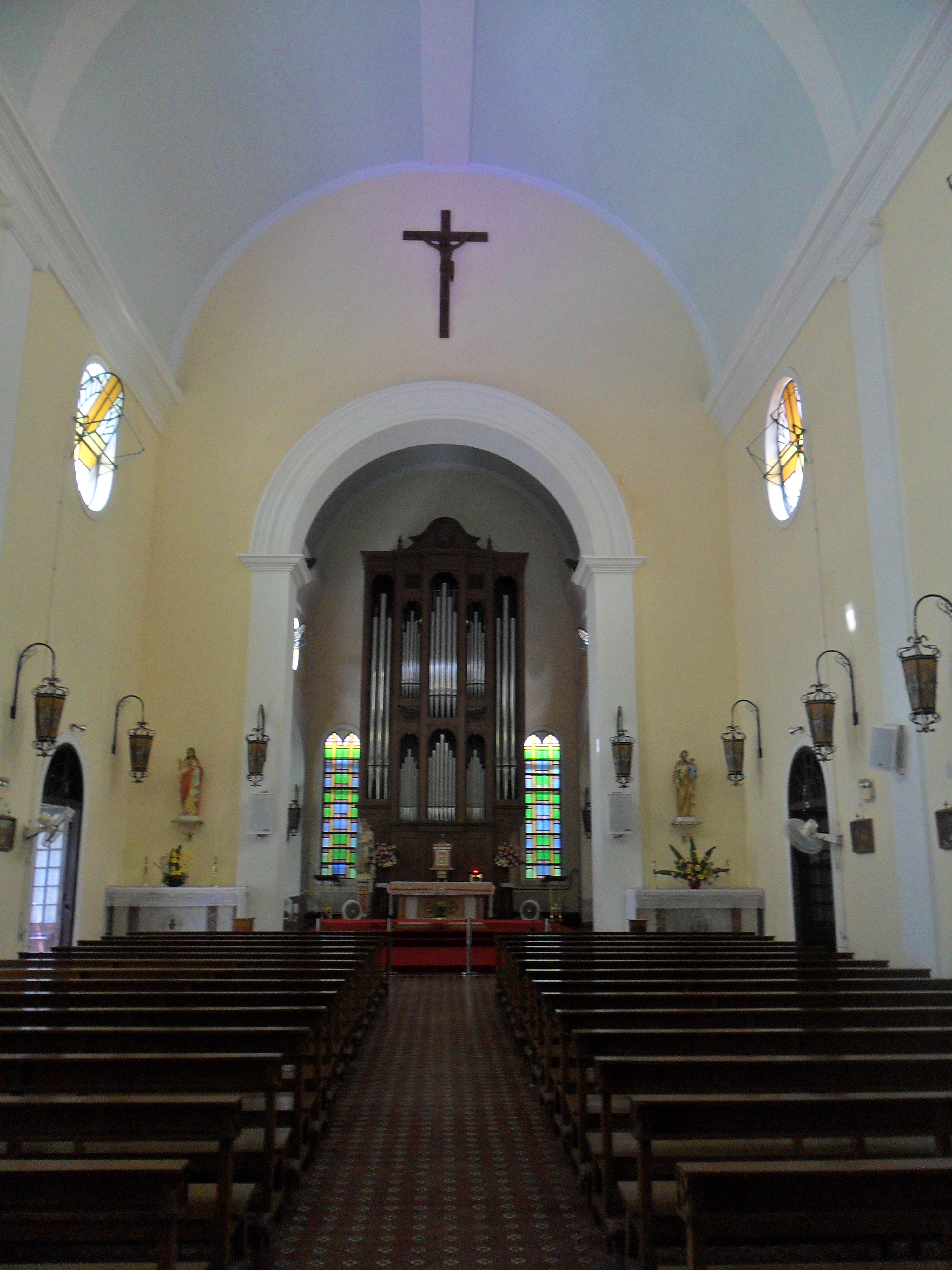 中文（香港）: 望德聖母堂, 澳門, 中國